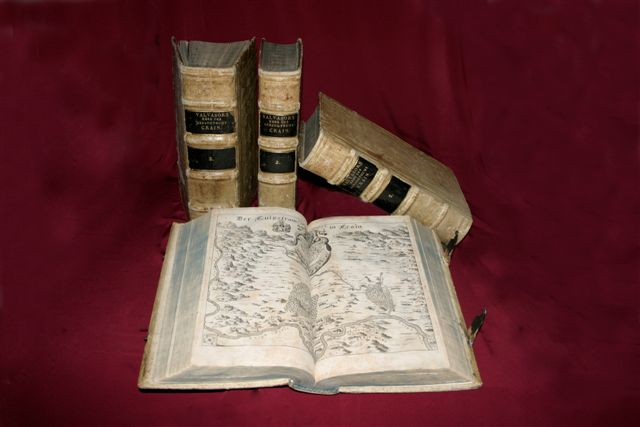 Izvirnik Slave vojvodine Kranjske iz leta 1689